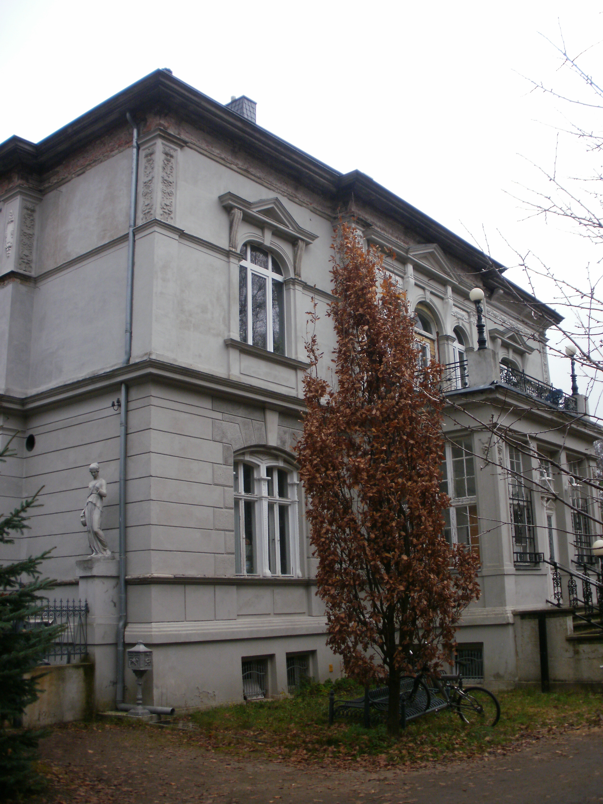 Fabrikantenvilla Ostrower Damm 3, Cottbus